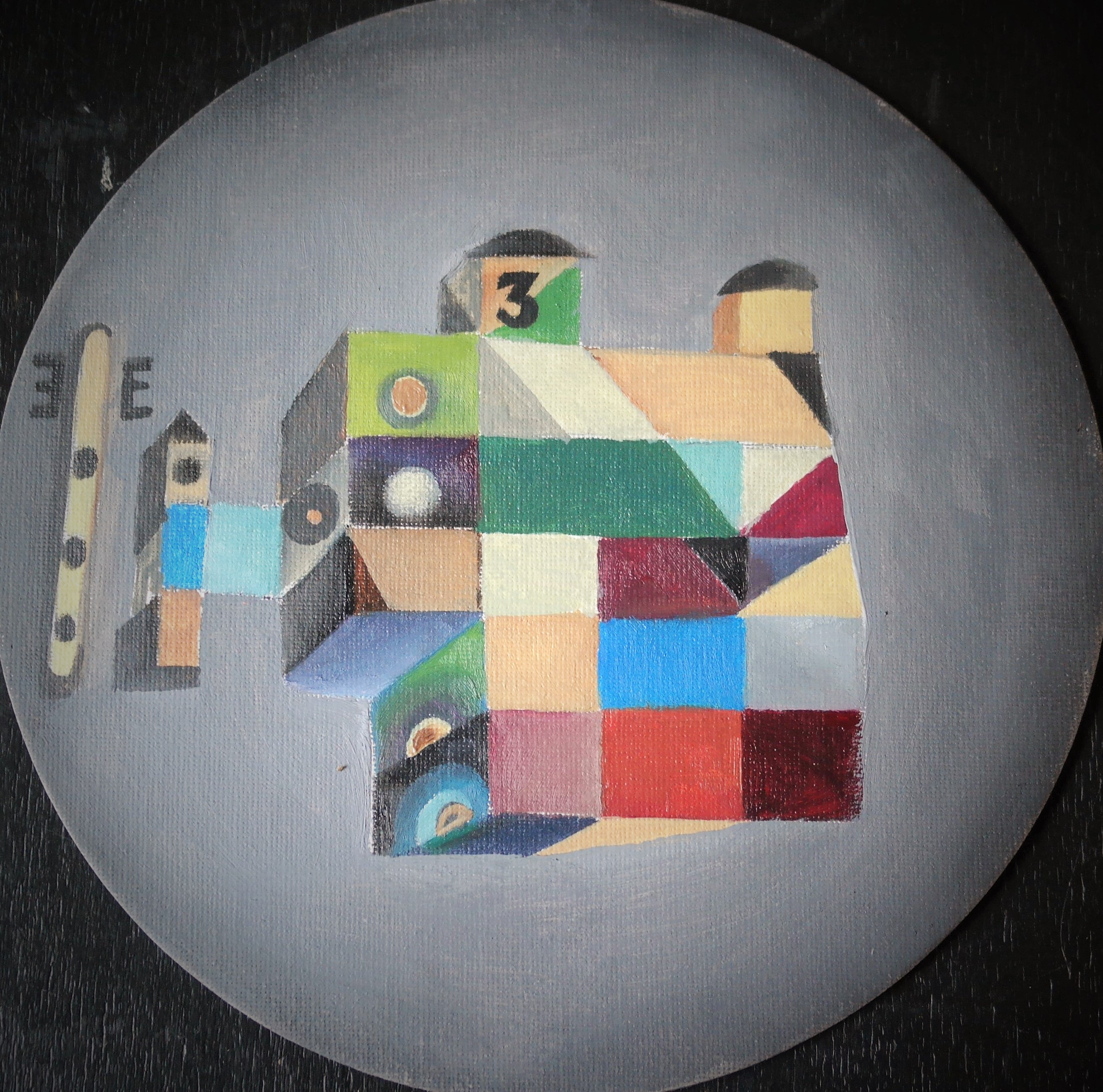 Круглая картина N°1 из серии "Звуковые Башни", 2016